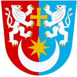 znak obce Pohořelice